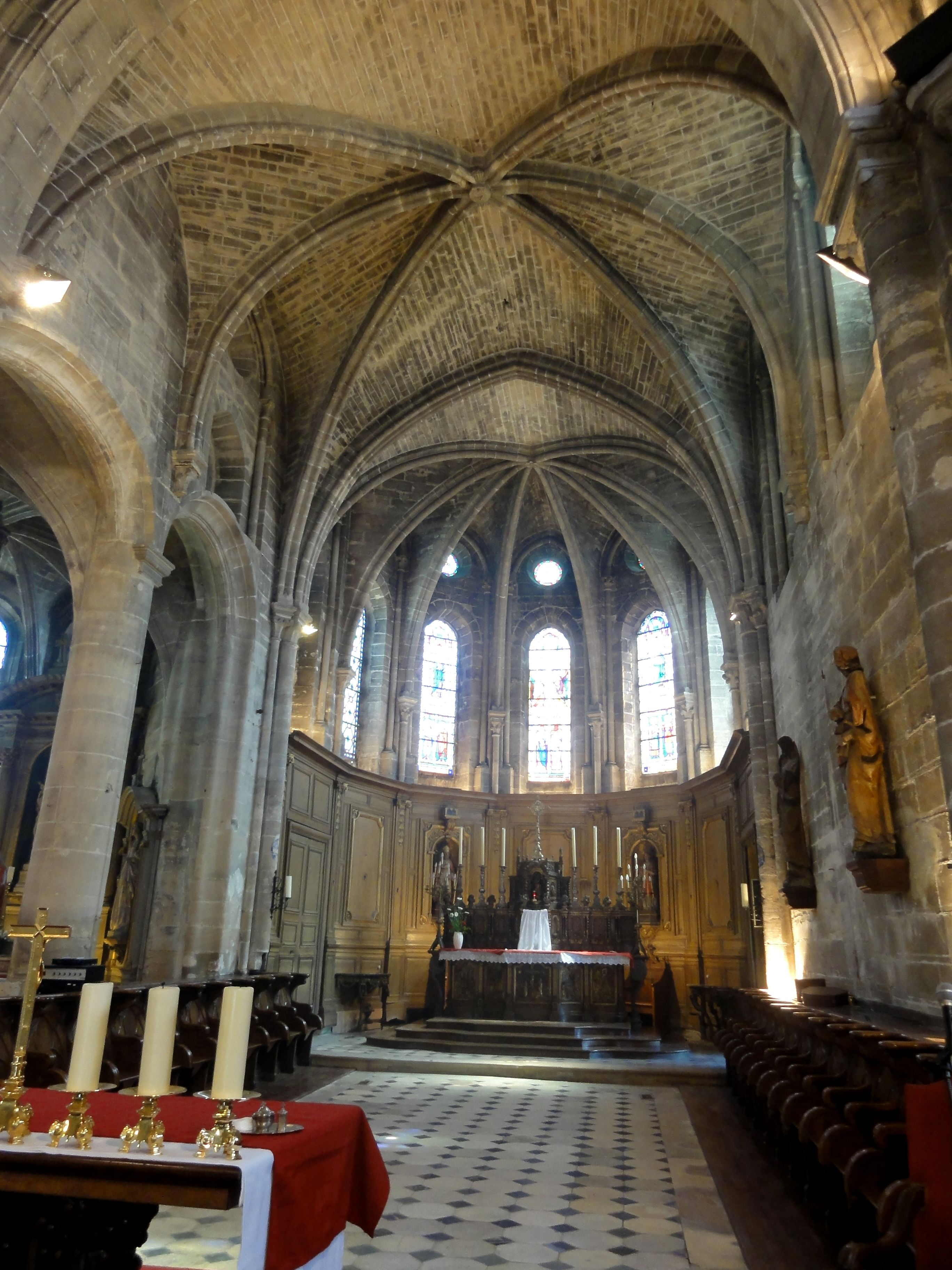 Chœur.